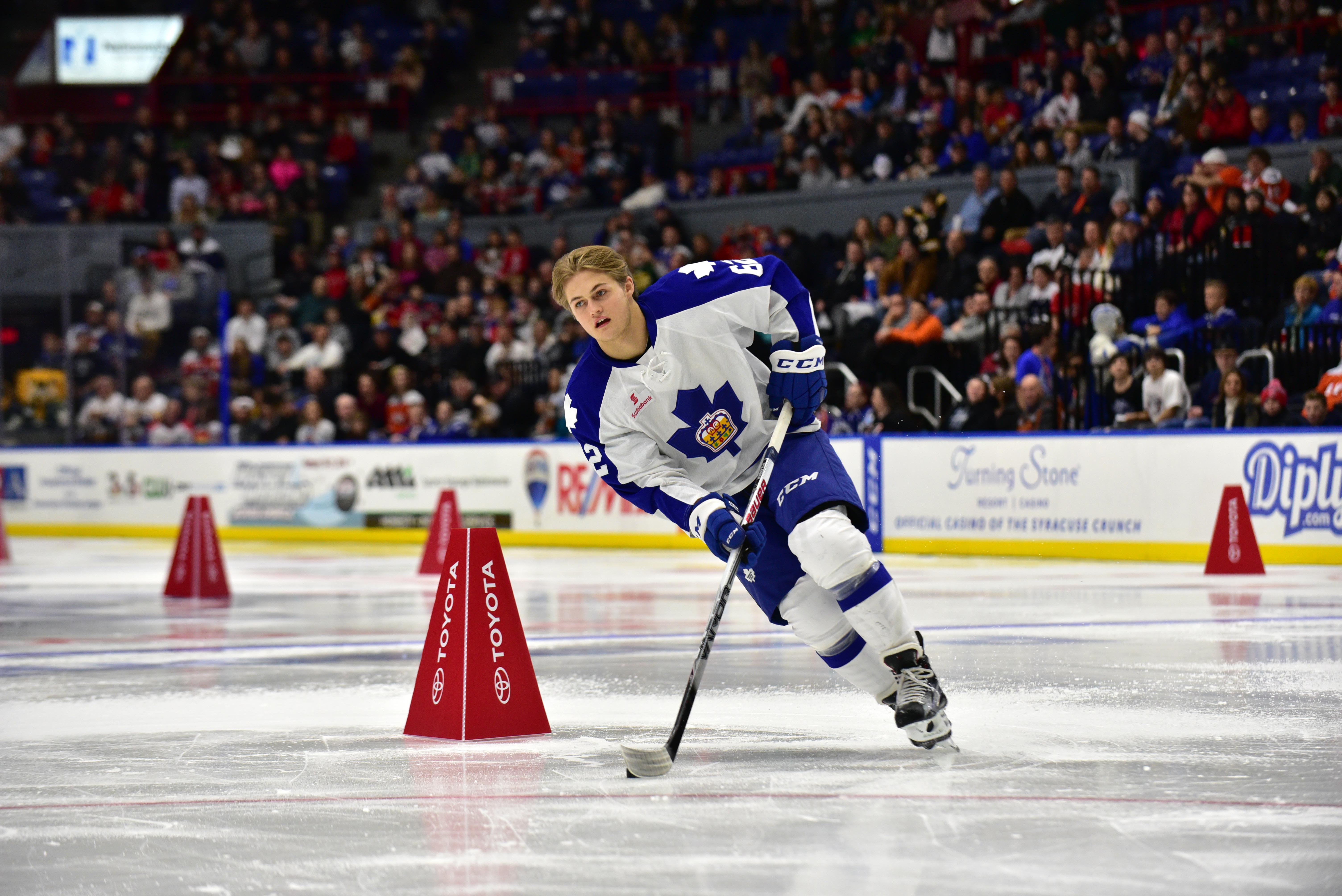 STP_20160131_357